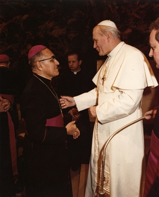 Monseñor Romero yl papa Juan Pablo II saliendo de una reunión privada en el Vaticano, unos meses después de asceder al trono pontificio.